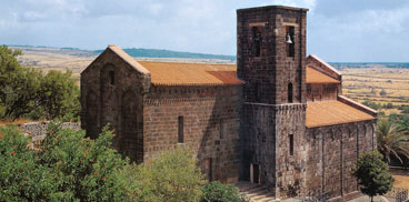 Sardegna Cultura, Immagine aerea di Basilica di Santa Maria di Bonarcado (Or), Licenza d'uso libera